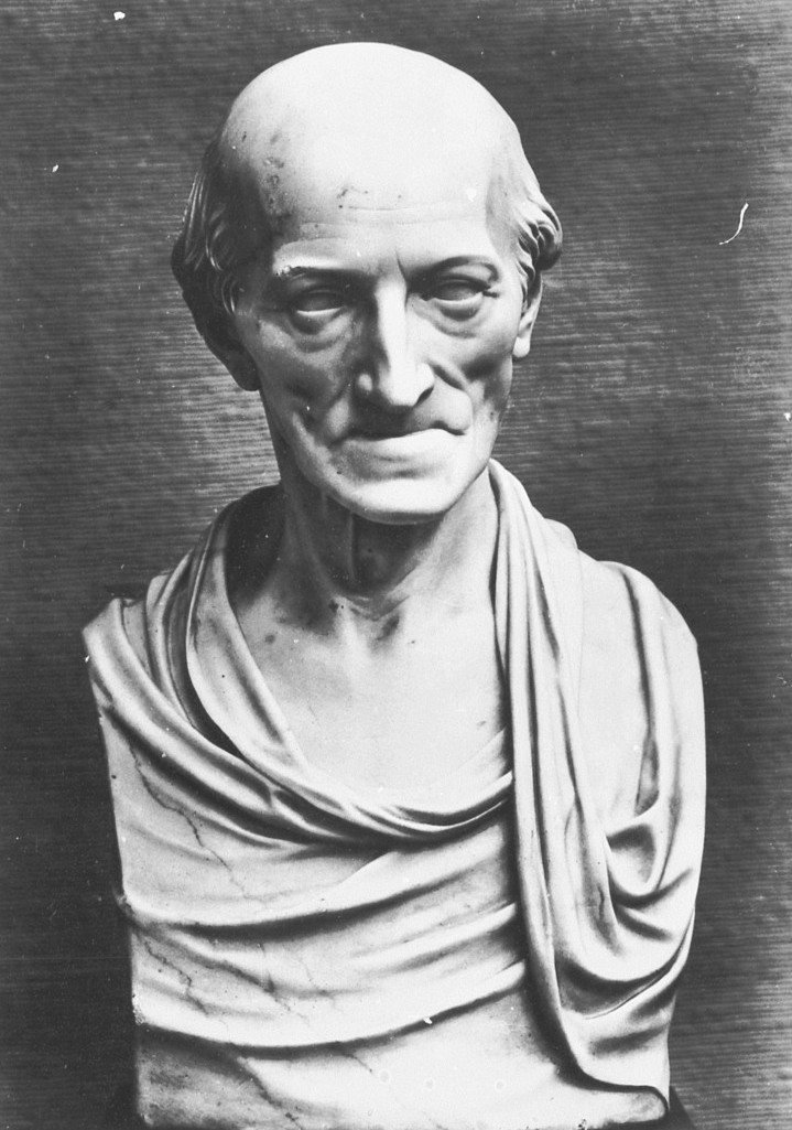 Schadow, Gottfried - Bildnis von Carl Friedrich Christian Fasch, Begründer der Sing-Akademie zu Berlin im Jahre 1791, 1800, Marmorbüste im Besitz der Sing-Akademie zu Berlin nach Faschs Totenmaske, Berlin, Sing-Akademie